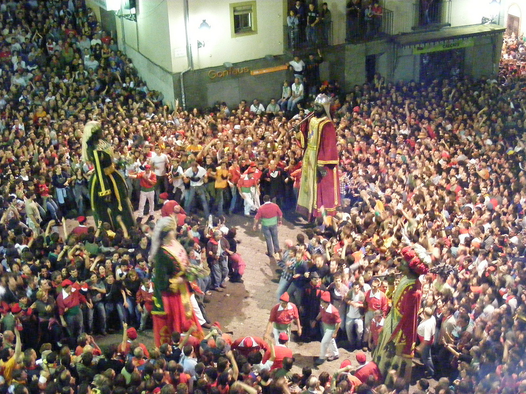 3r Salt - Ball de Gegants, 2009